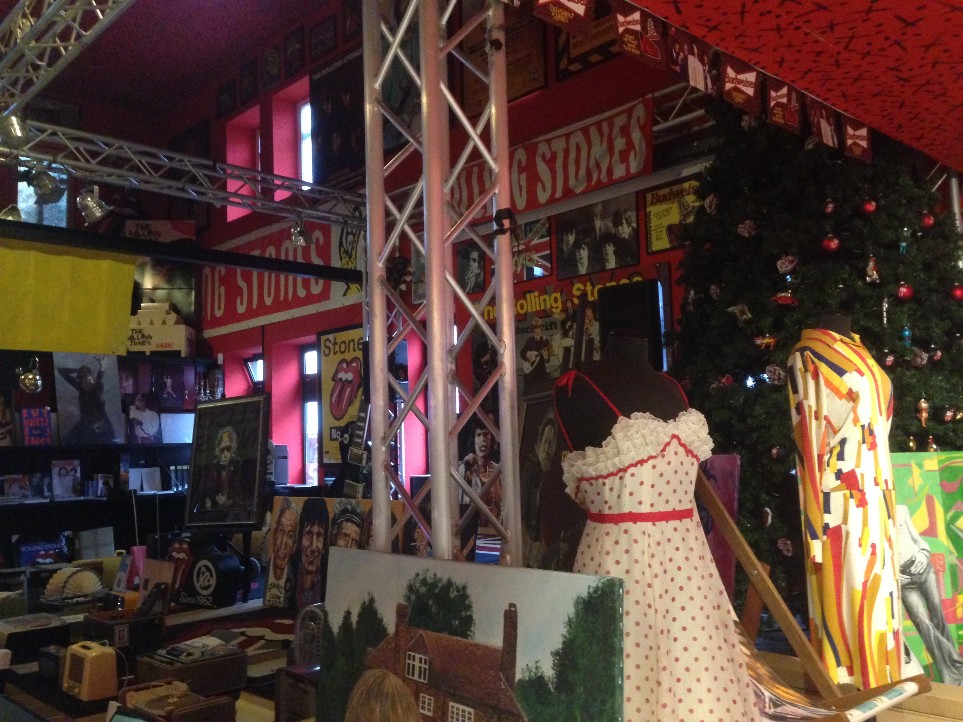 Stones Fan Museum, Lüchow, Germany